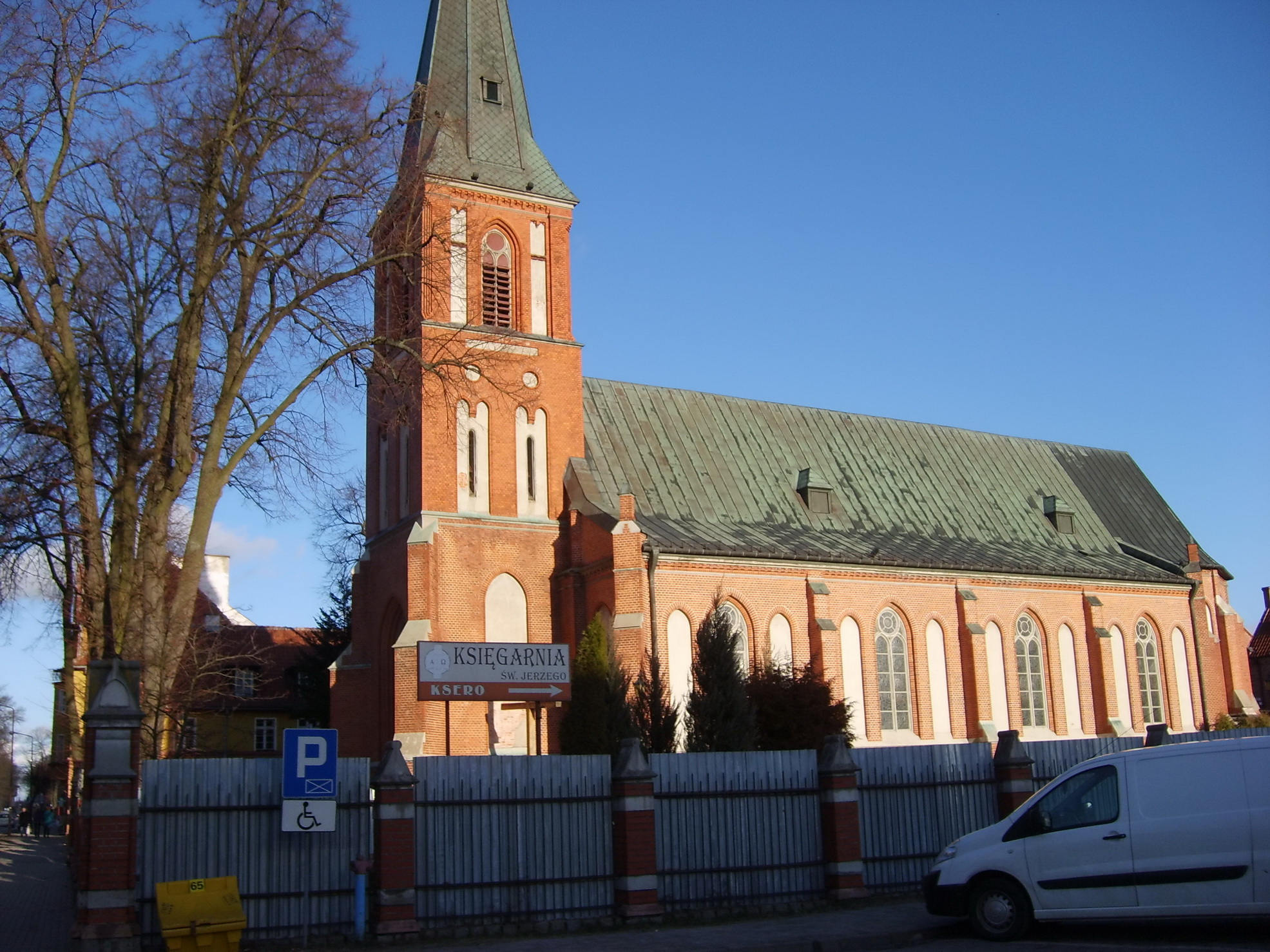 Город Элк